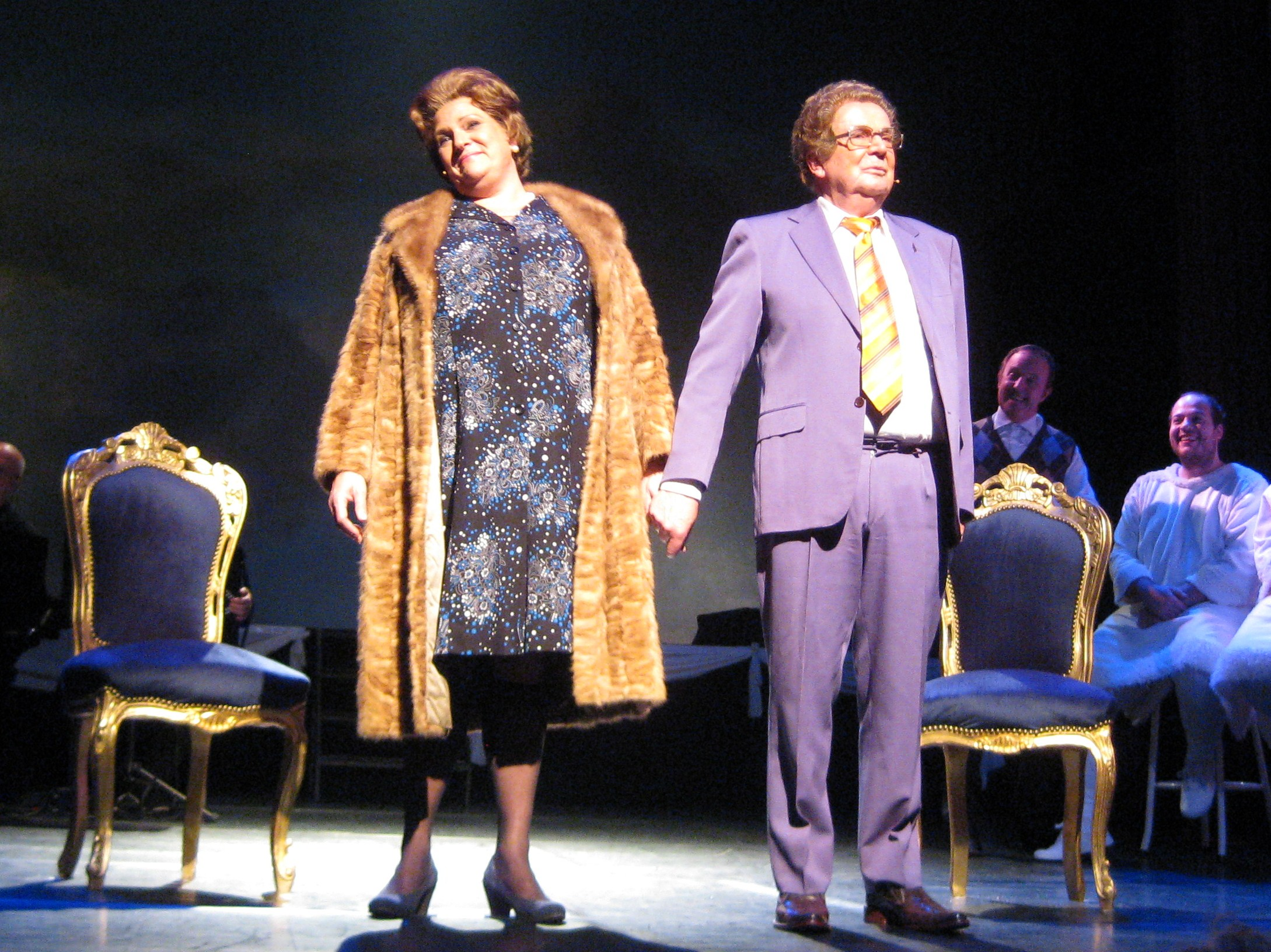 Marjolijn Touw als Tante Leen en Rob van de Meeberg als Johnny Jordaan in Kerstfeest in de Jordaan in Theater Het Zonnehuis in Amsterdam. December 2016